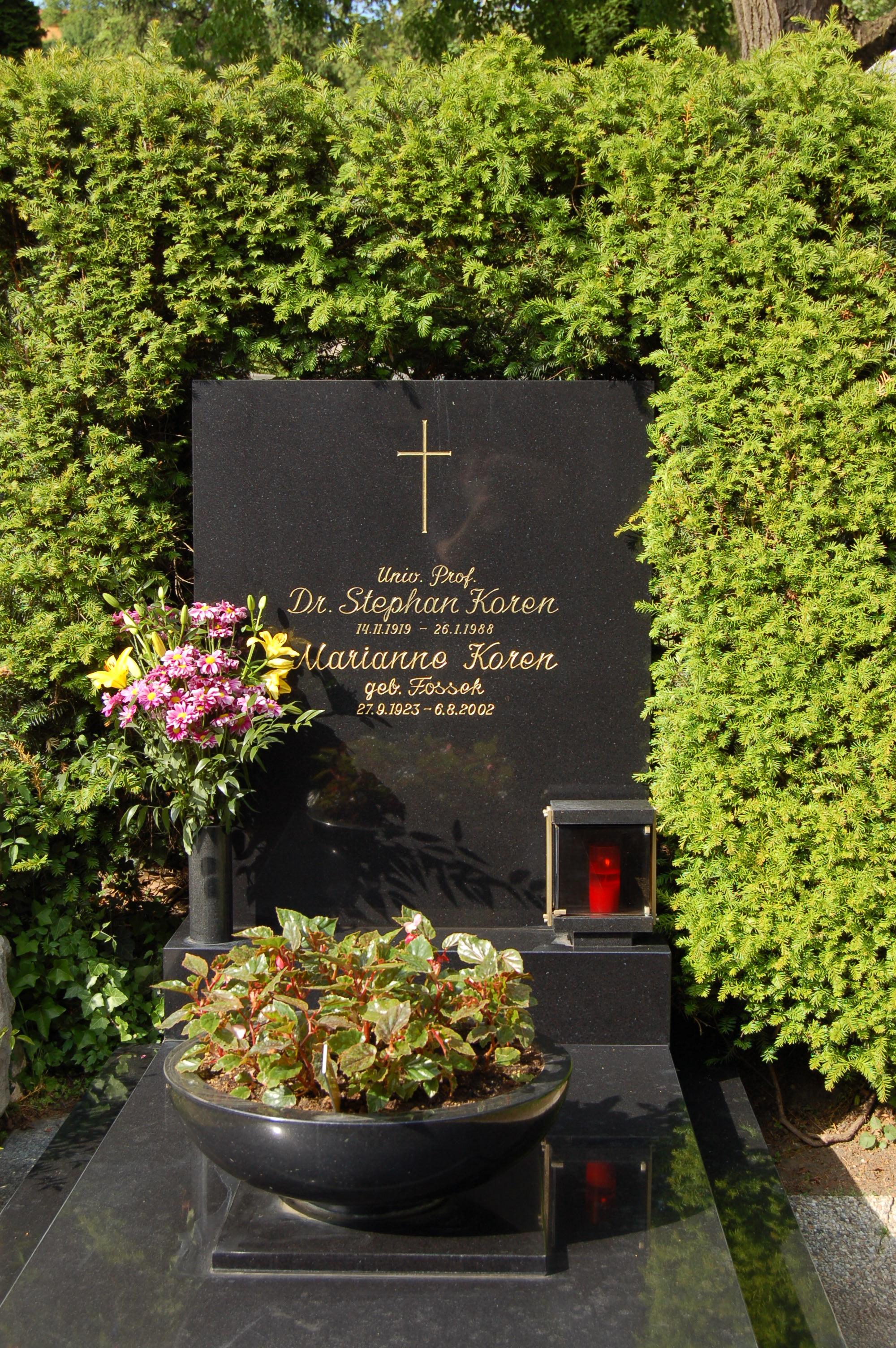 Dornbacher Friedhof, Grabmal von Stephan Koren